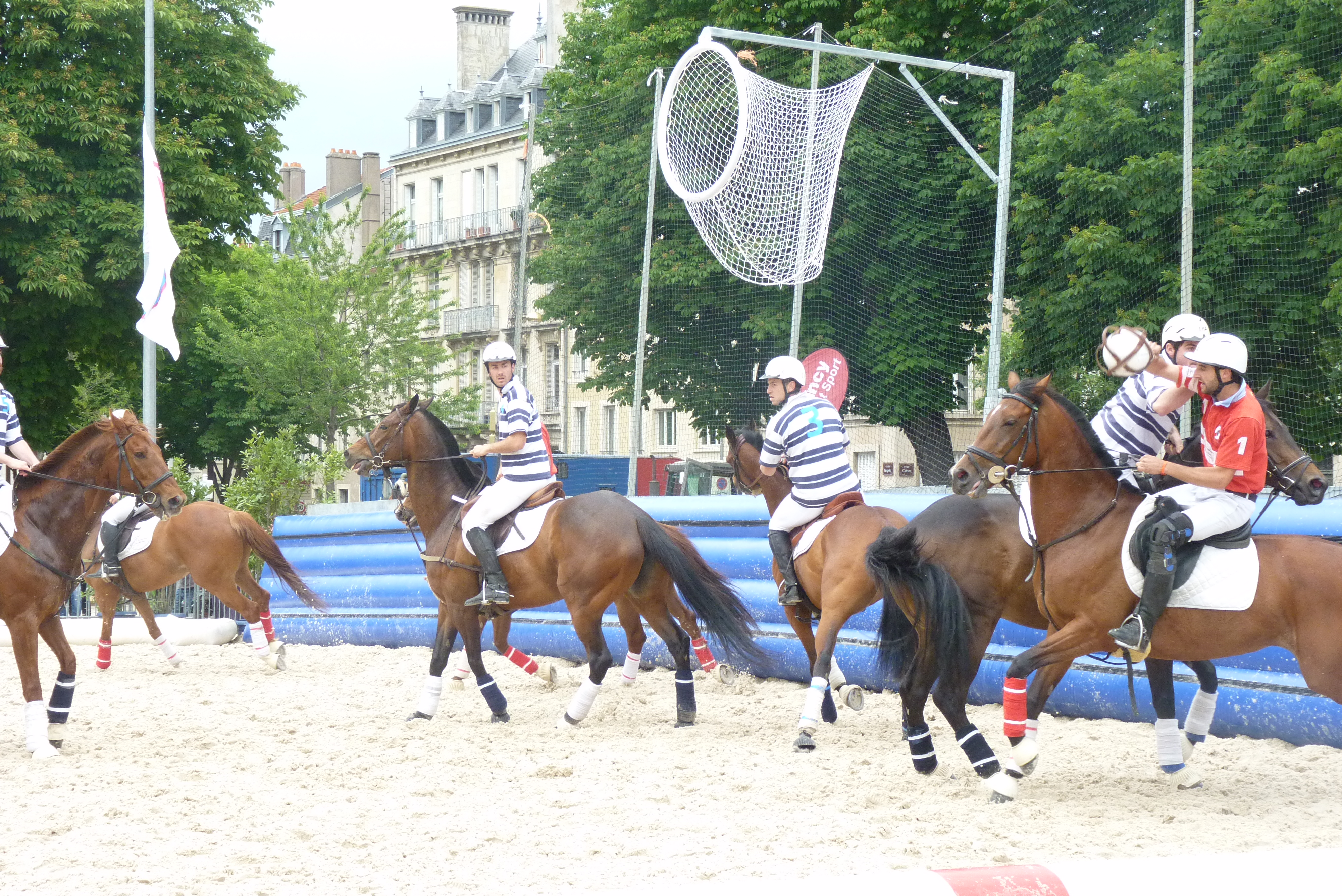 Finale du championnat de France de Horseball 2010 à Nancy (France).